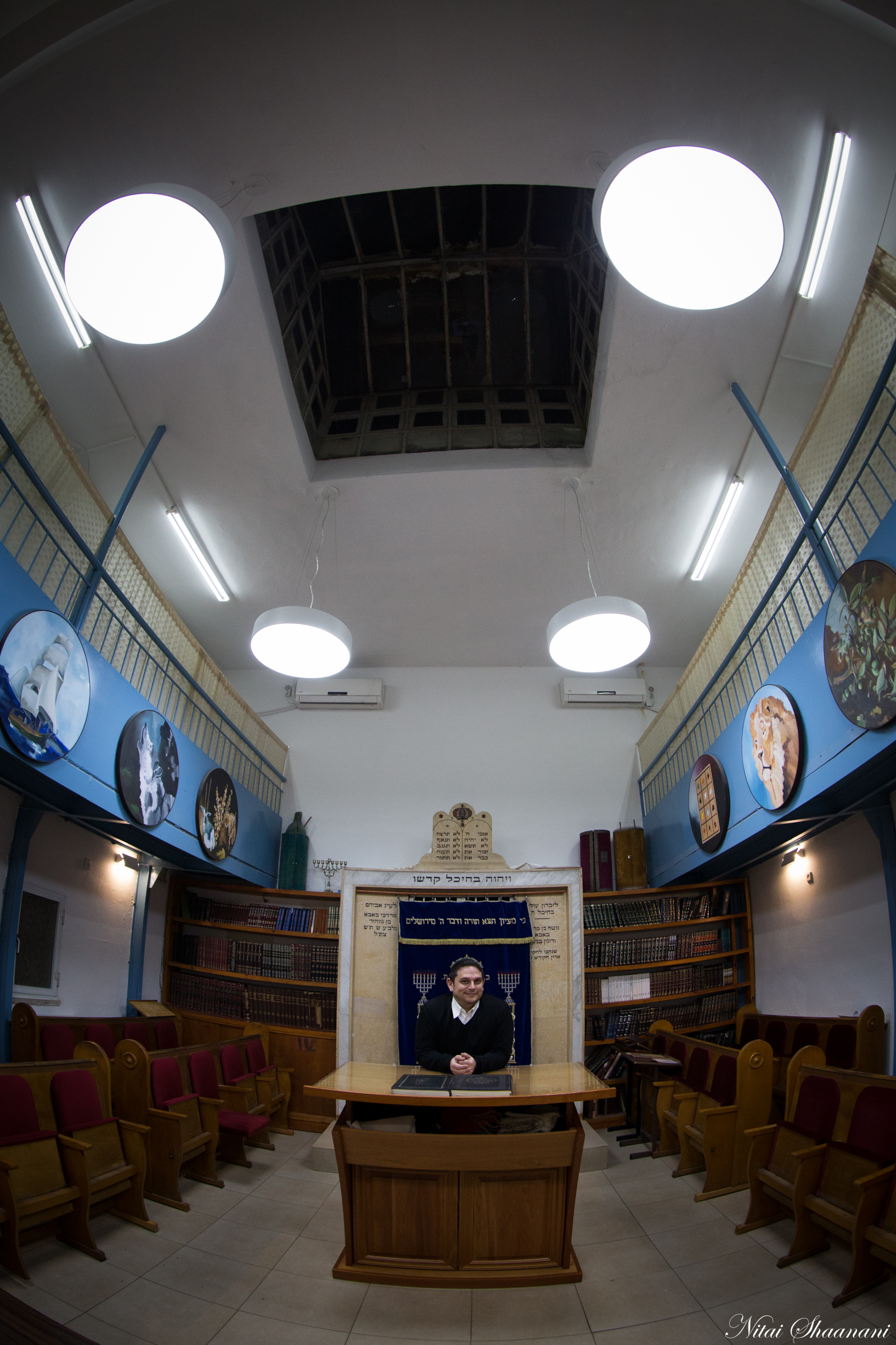 Jerusalem